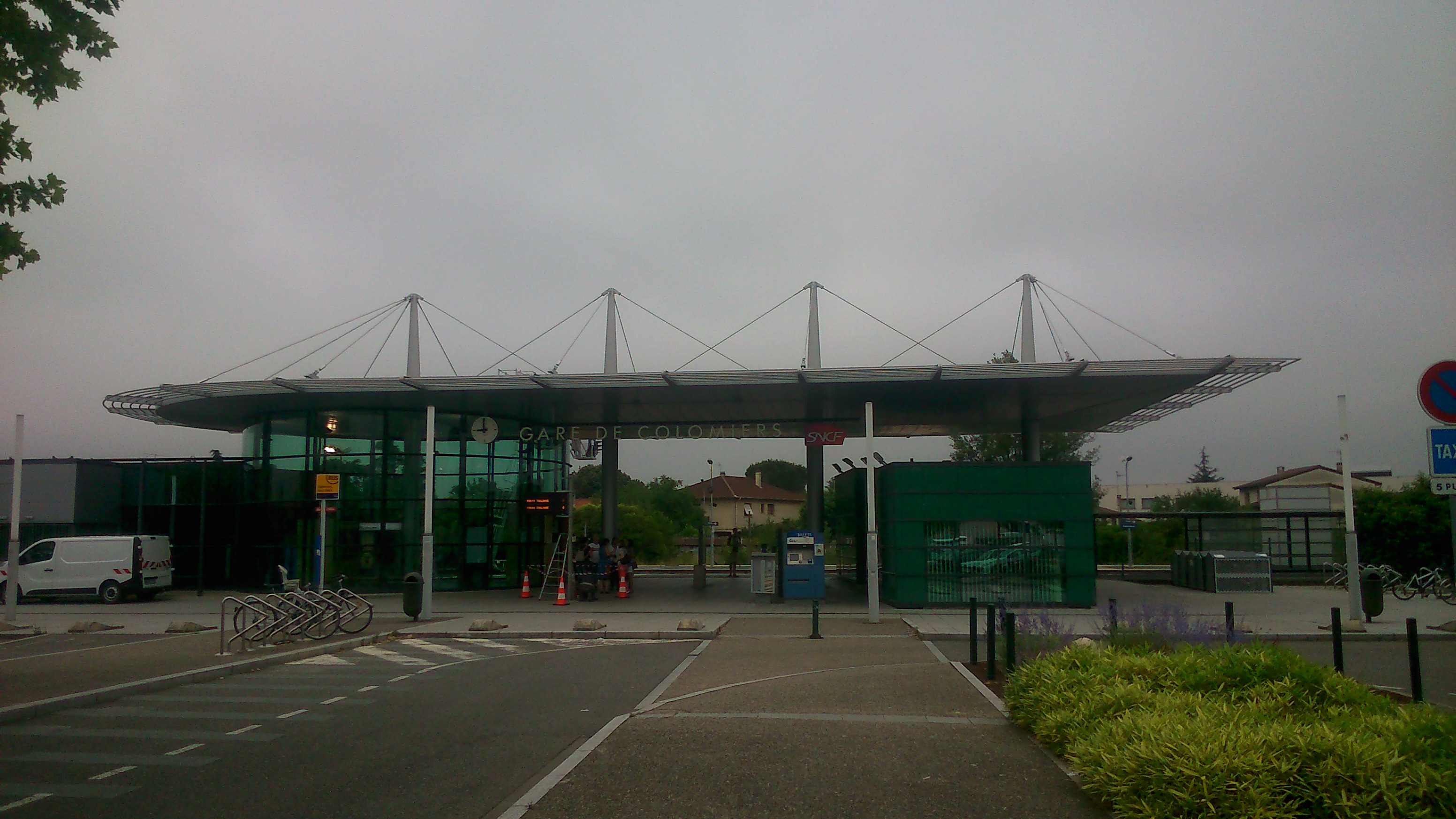 Devanture de la gare de Colomiers